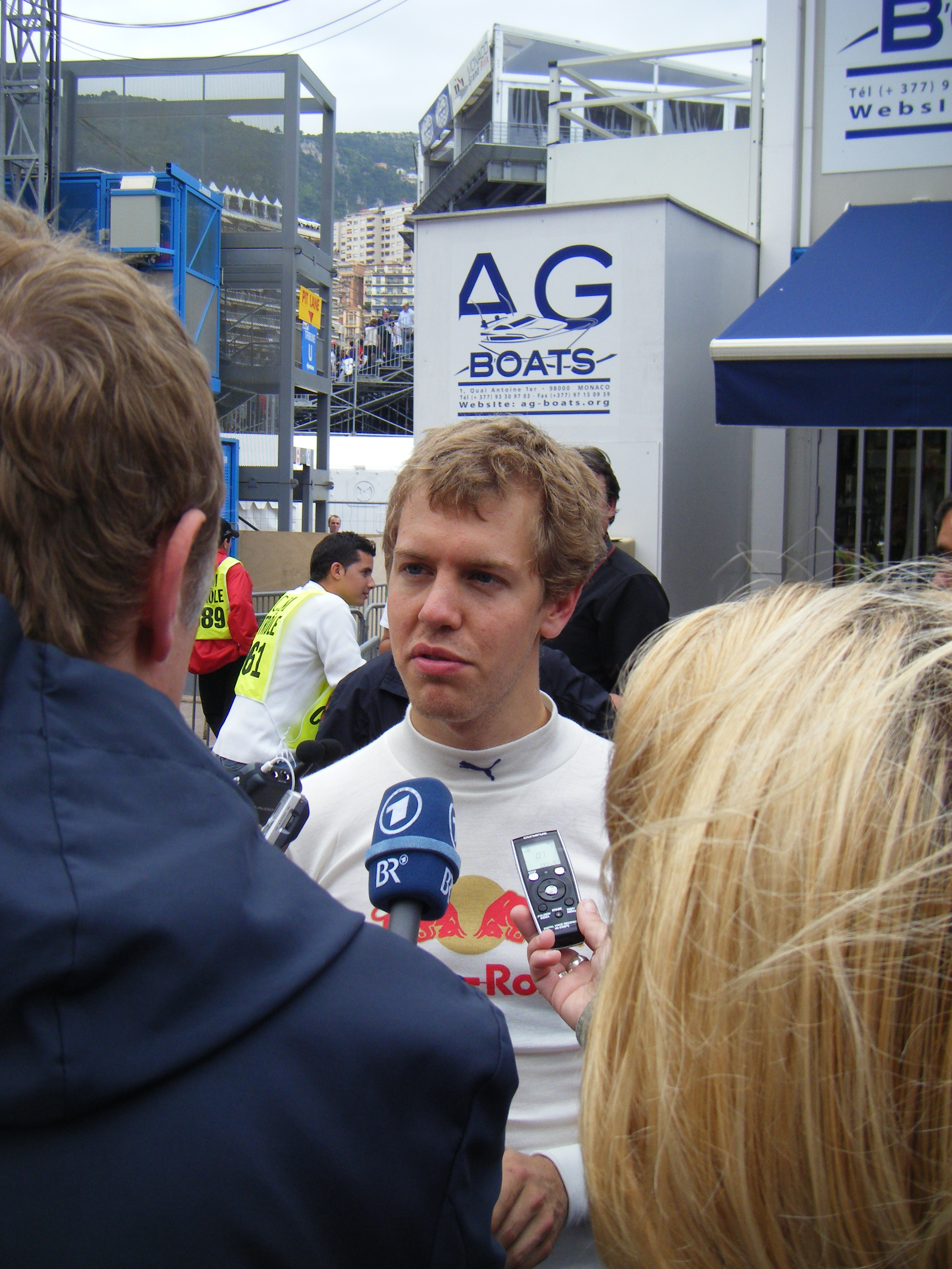 Sebastian Vettel lors du Grand Prix de Monaco 2008.